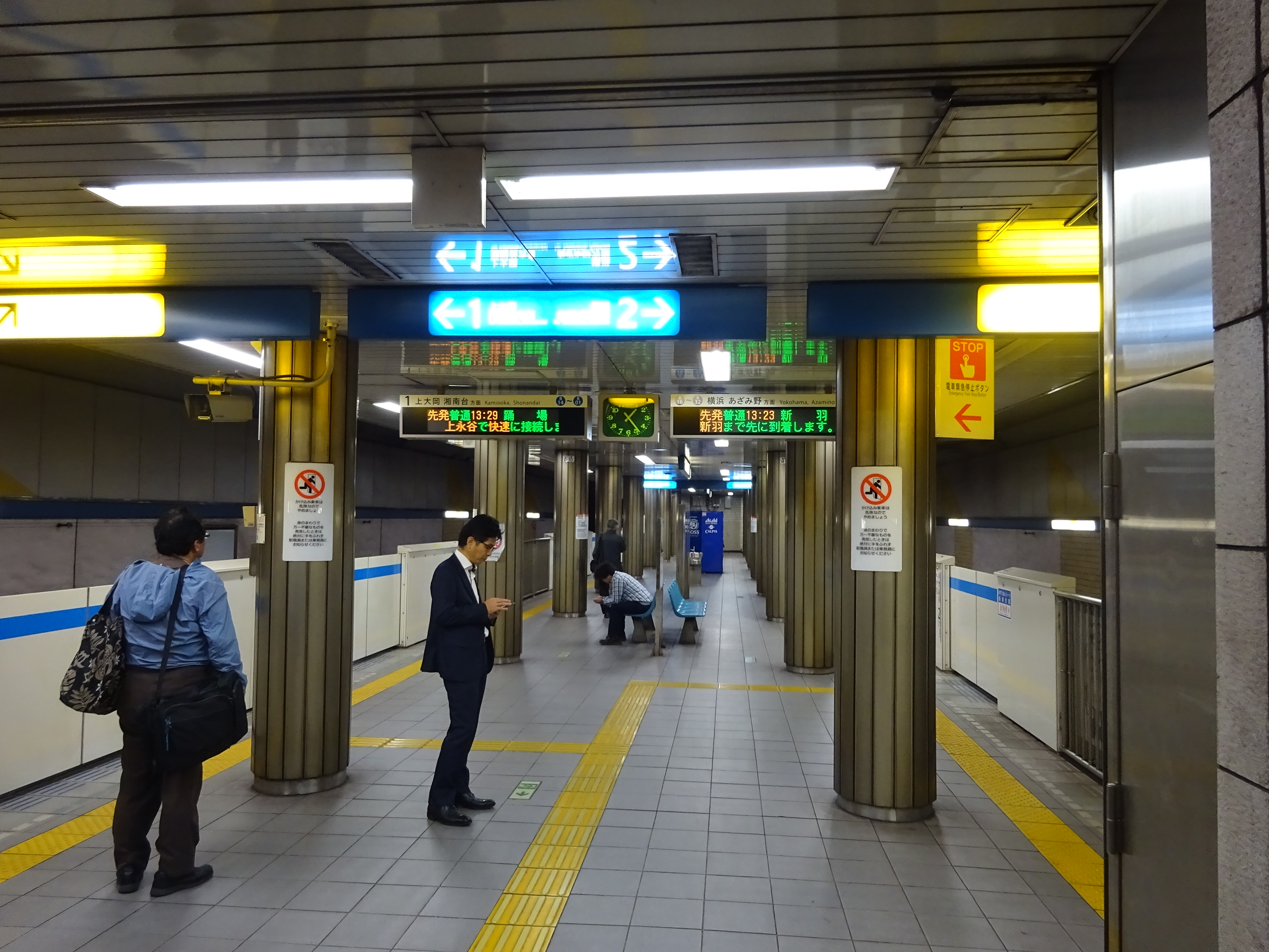 横浜市営地下鉄阪東橋駅ホーム（2016年10月撮影）